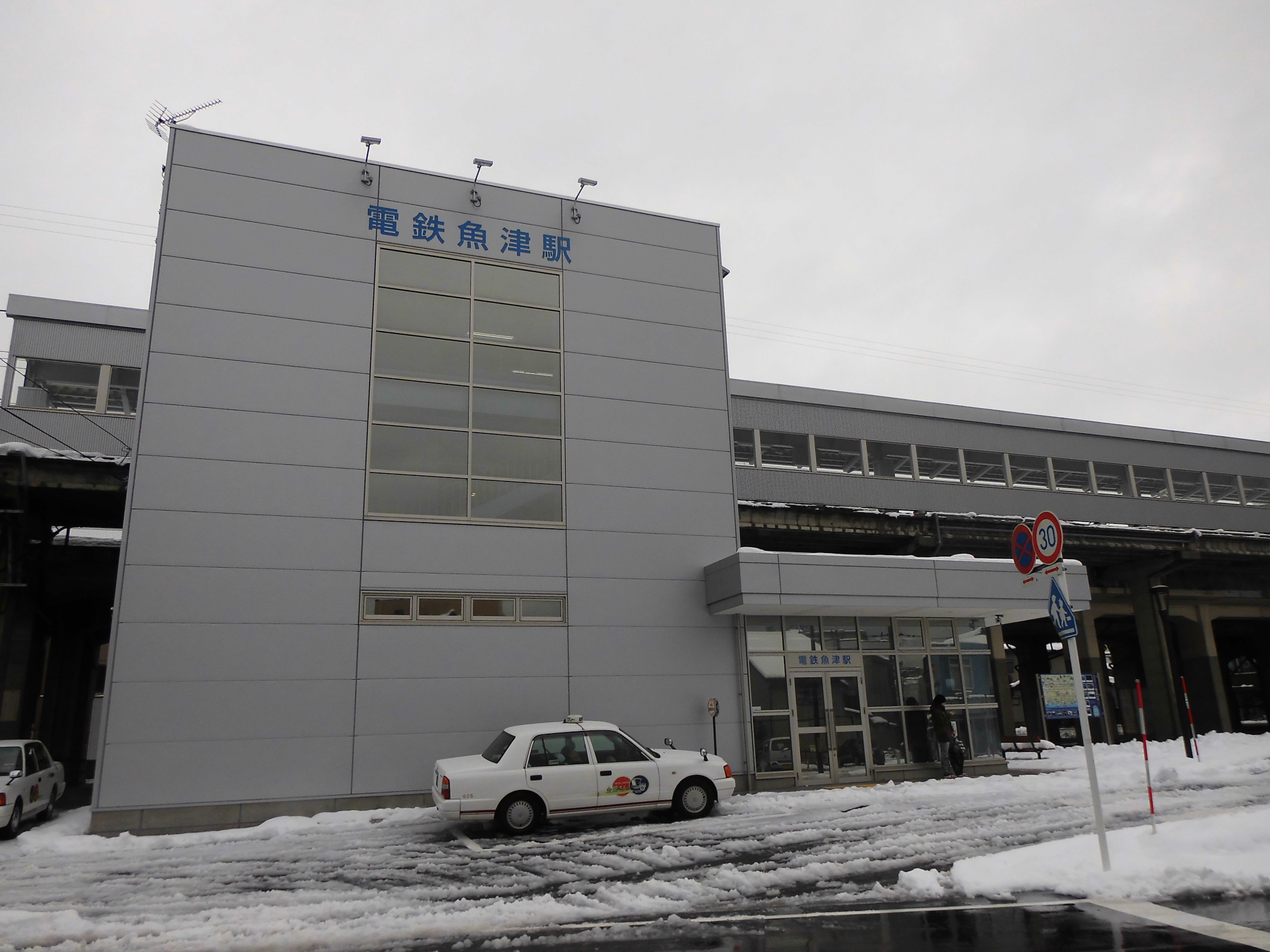 2013年6月4日に供用を開始した、富山地方鉄道本線の電鉄魚津駅新駅舎